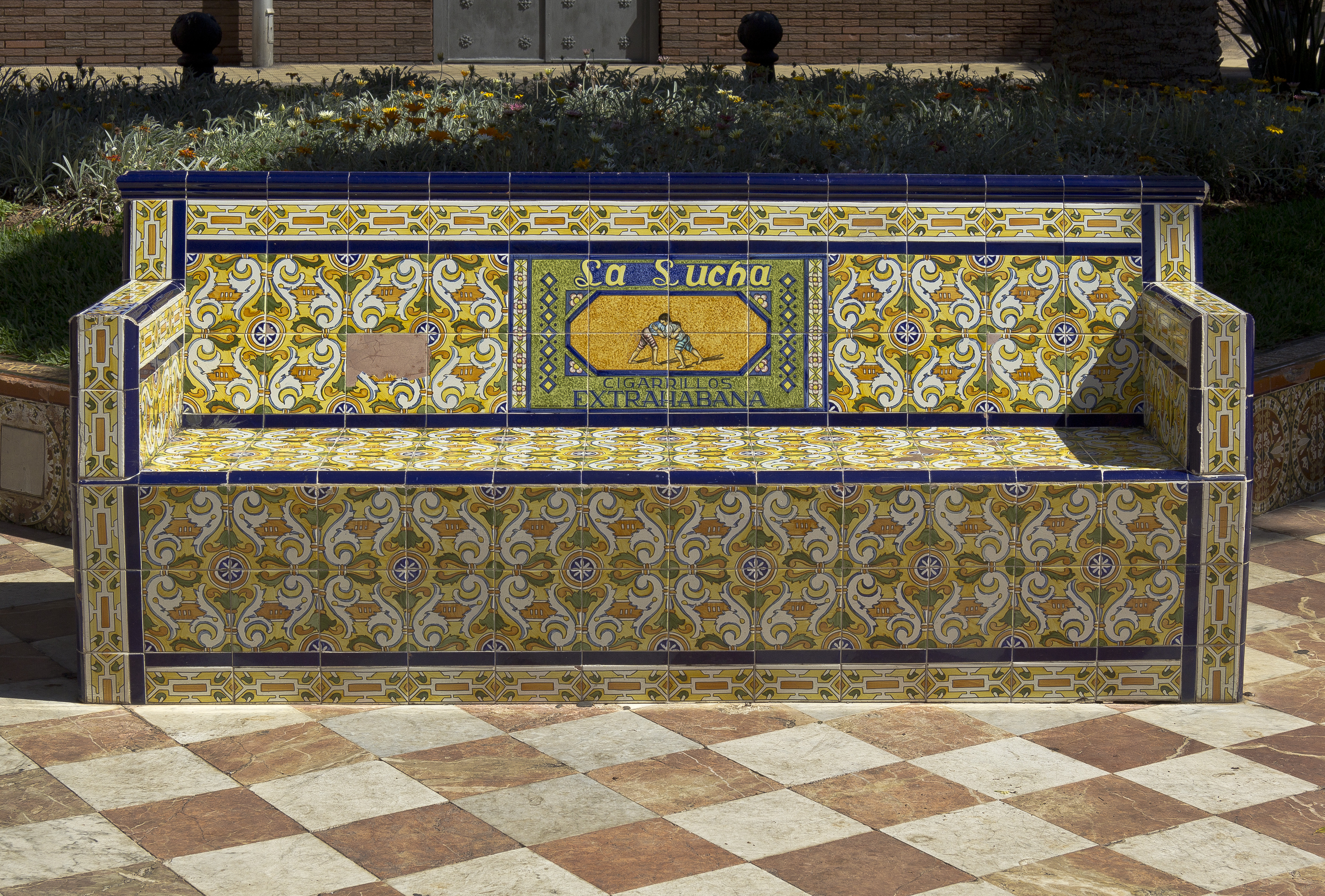 Bank auf der Plaza del 25 de Julio in Santa Cruz de Tenerife